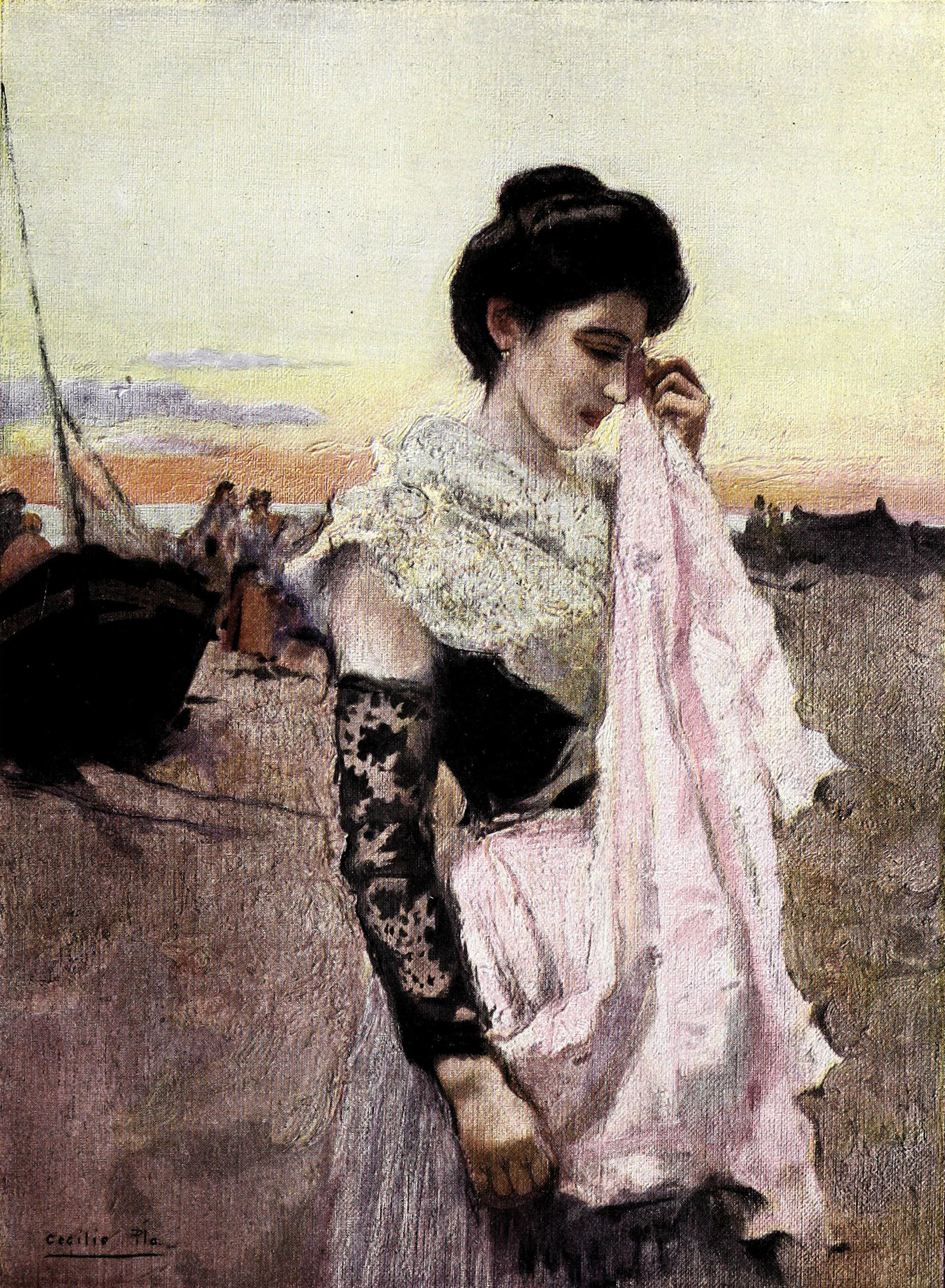 Figuras teatrales III. Marina.